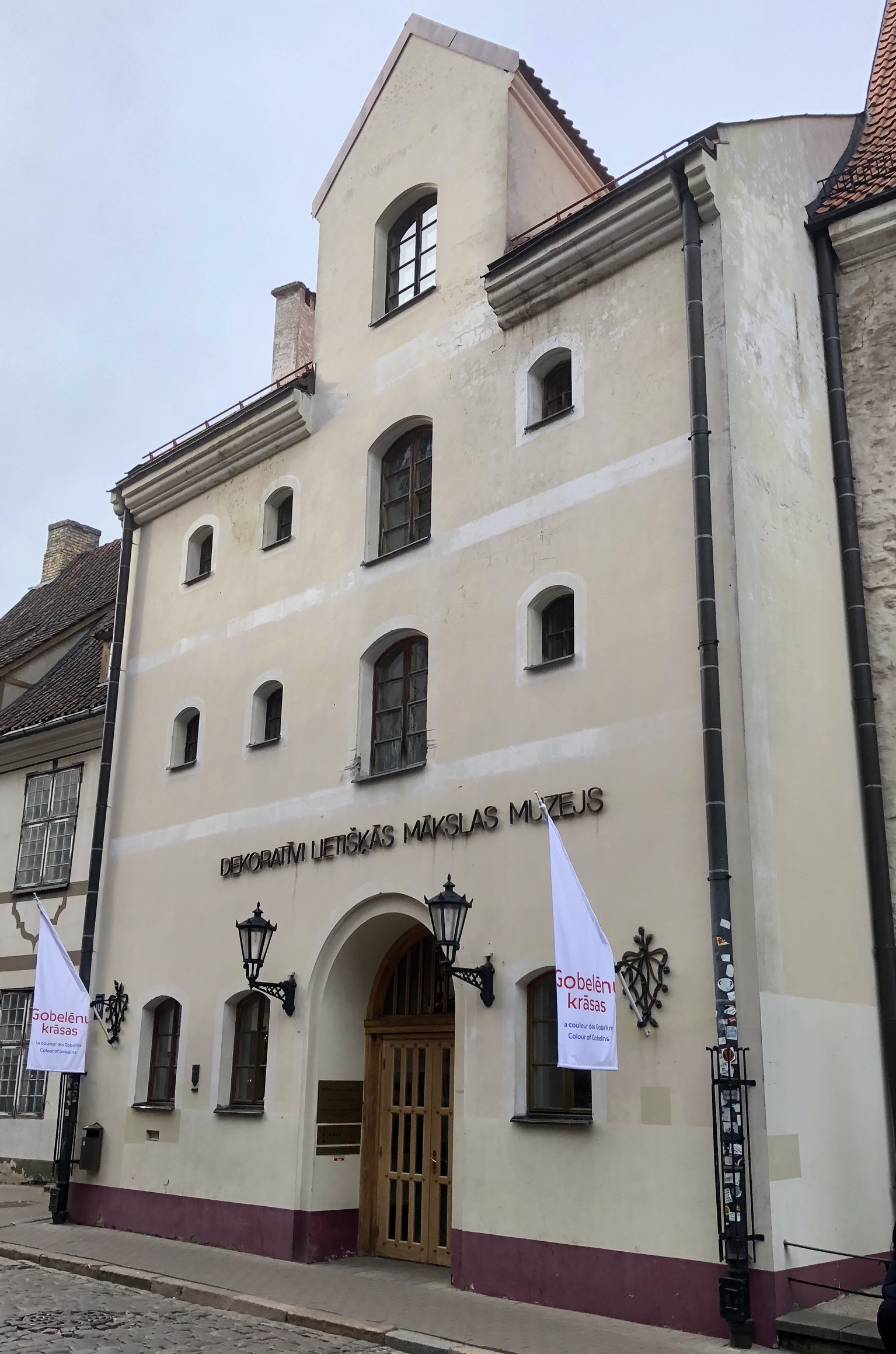 Lettisches Museum für angewandte Kunst